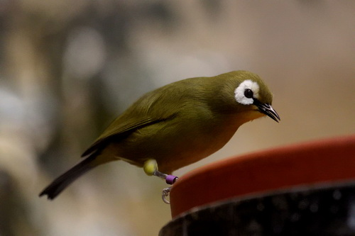 Килиманджарская горная белоглазка (Zosterops poliogastrus eurycricotus), Гамбургский зоопарк (Тирпарк Карла Гагенбека)